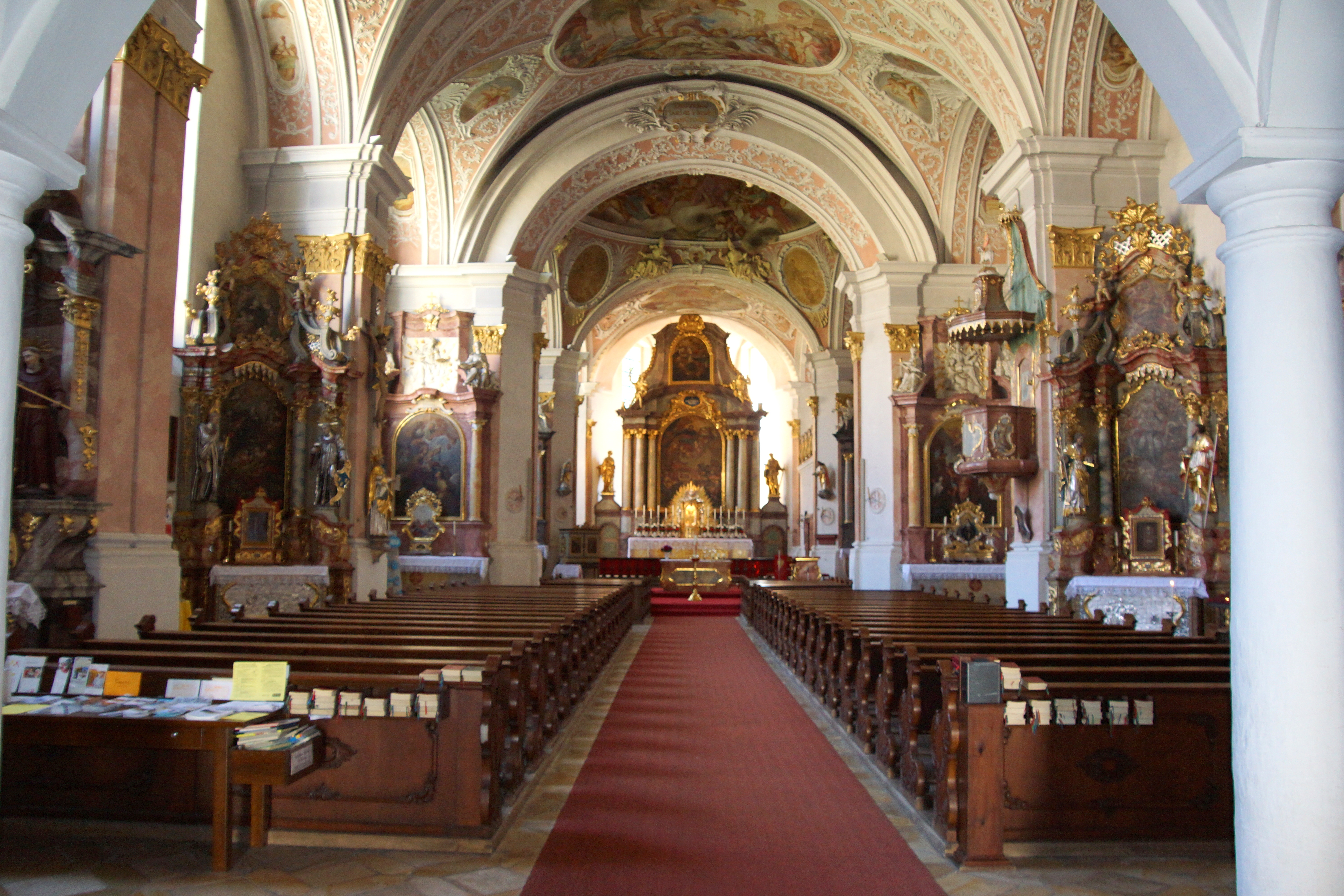 Die Klosterkirche St. Jakob im Oberpfälzischen Ensdorf